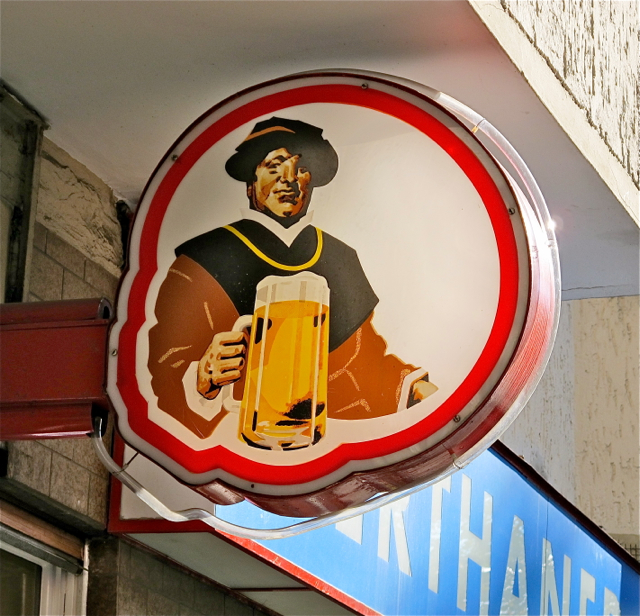 Schultheiss-Neonschild in Neukölln in Berlin